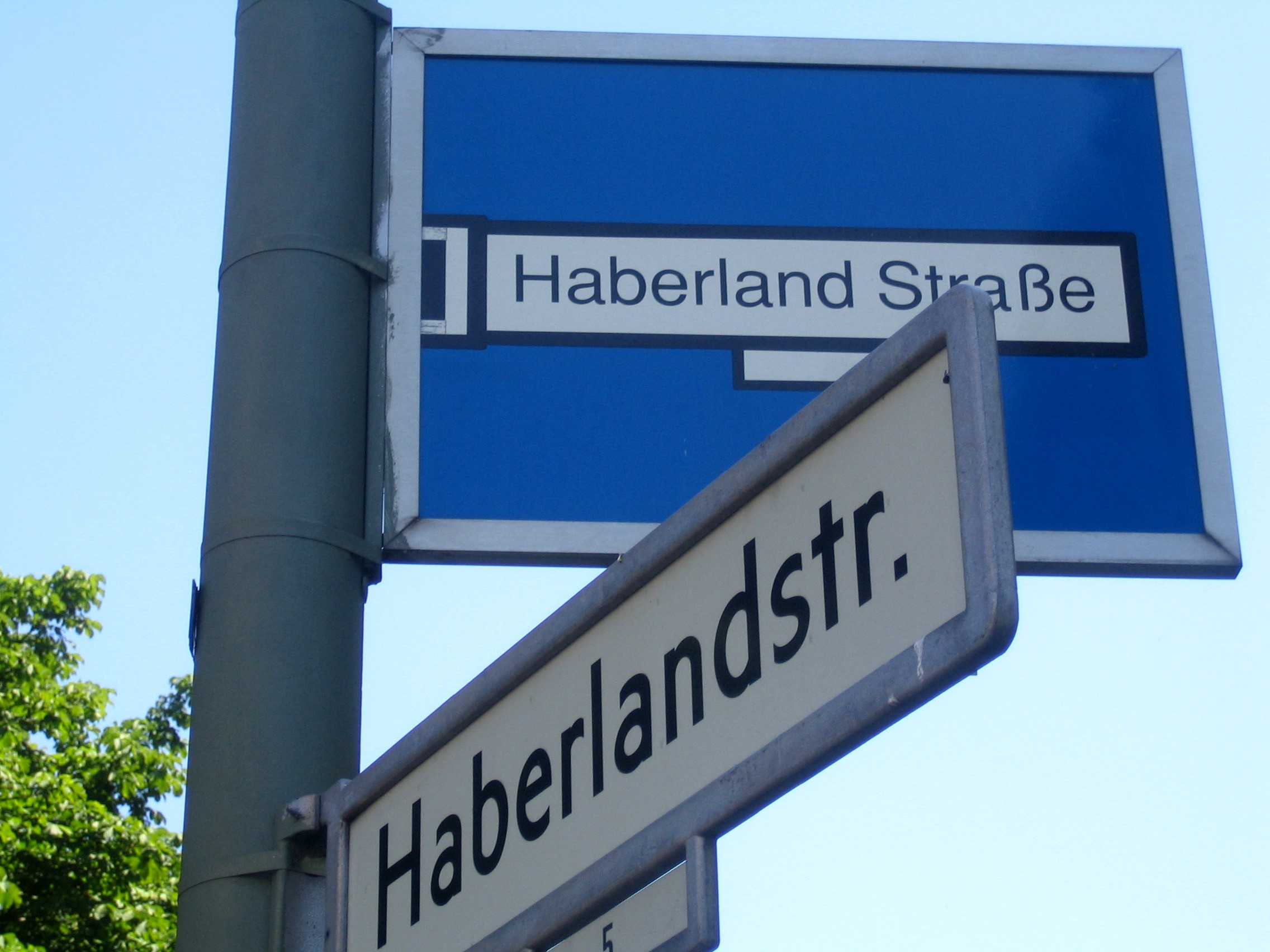 Berlin-Schöneberg, Bayerisches Viertel. Denkmal zur Erinnerung an die Unterdrückung der Juden 1933-1945. Tafel zur Umbenennung von Straßennamen, Bildseite